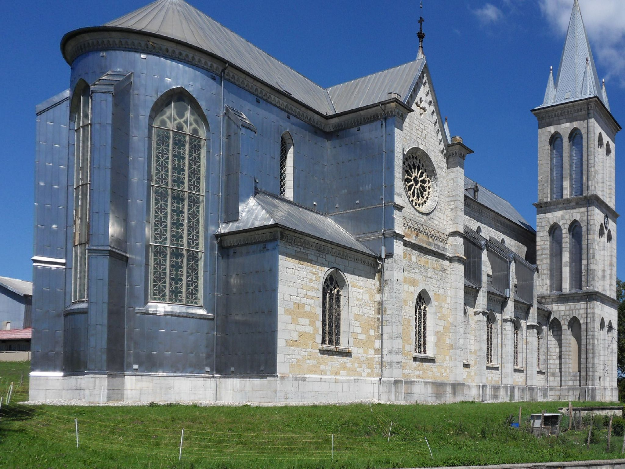 Église de Boujailles Région de Franche-Comté. Département du Doubs